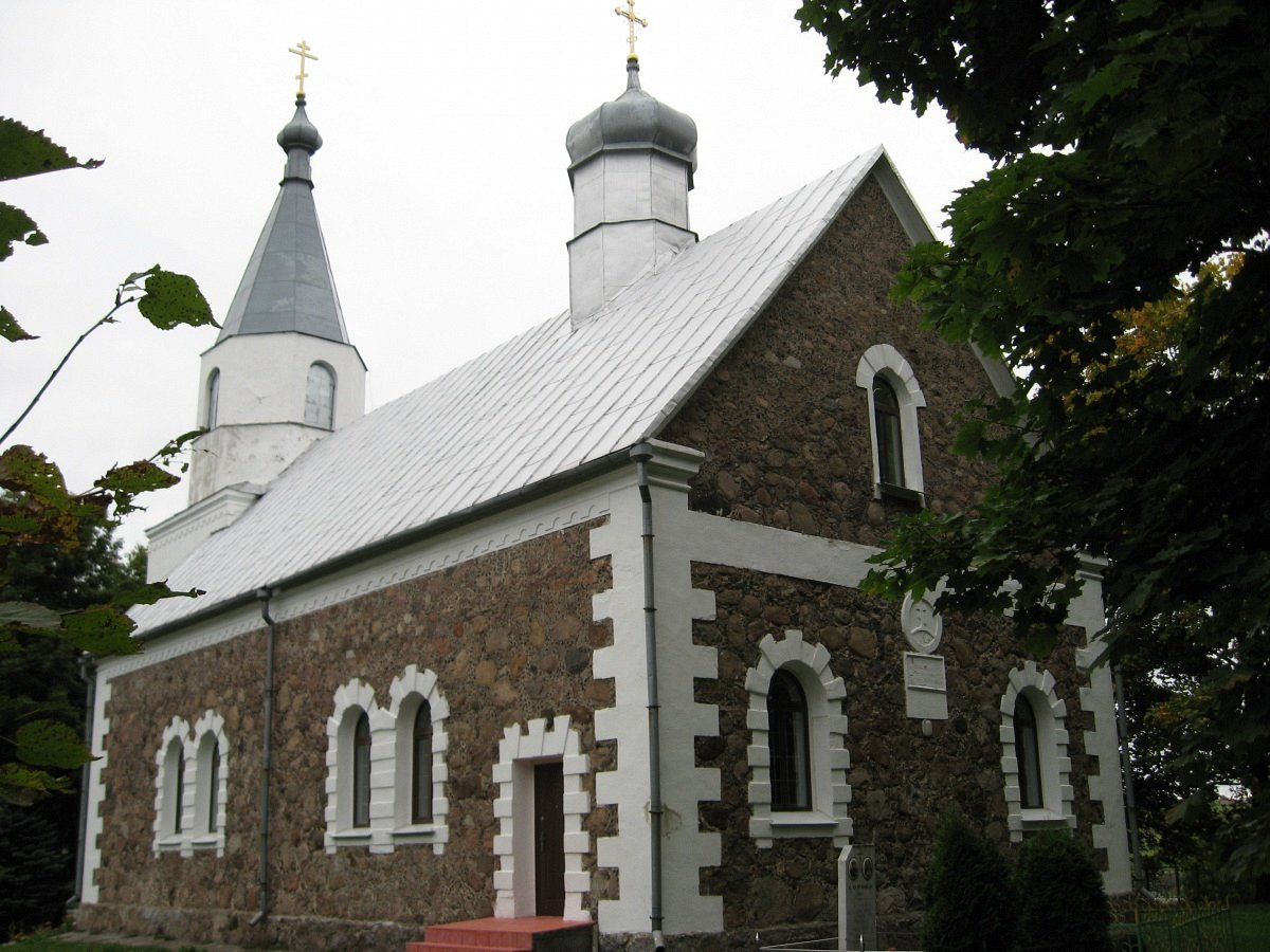 Крэва. Царква Аляксандра Неўскага